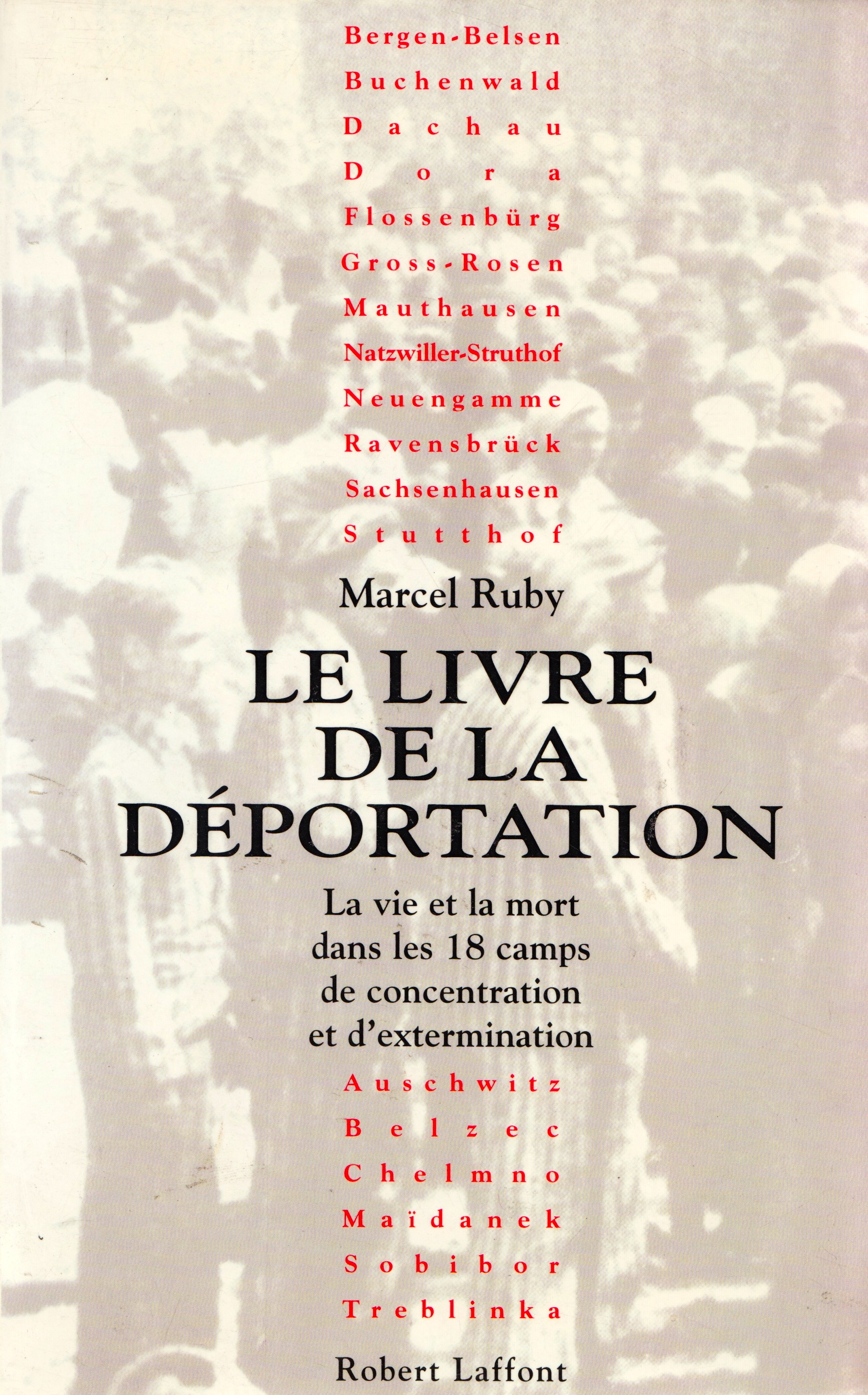 Publié en 1995, Editeur Robert Laffont